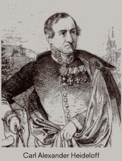 Carl Alexander Heideloff. Zeichnung